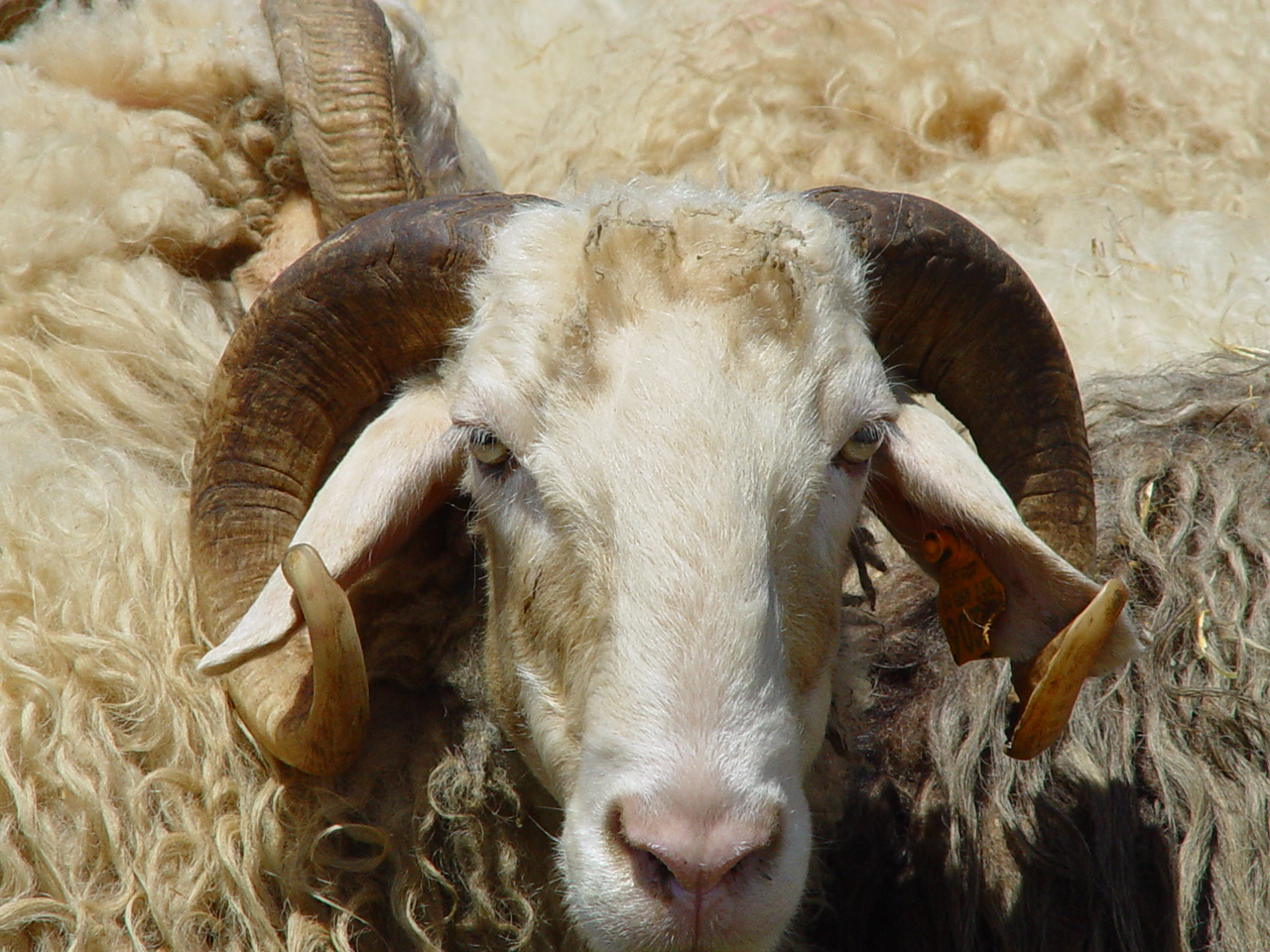 Tête de brebis de race basco-béarnaise vue de face